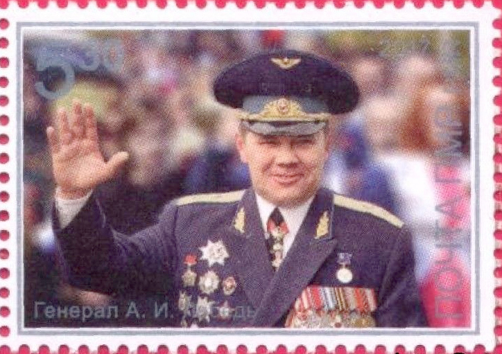 General Alexander Lebed